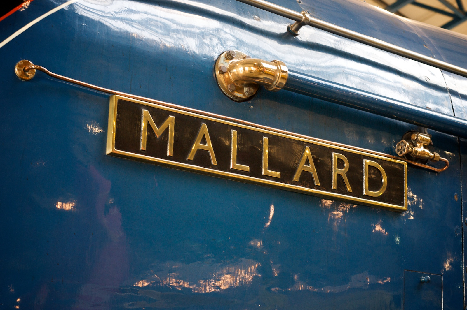 Mallard